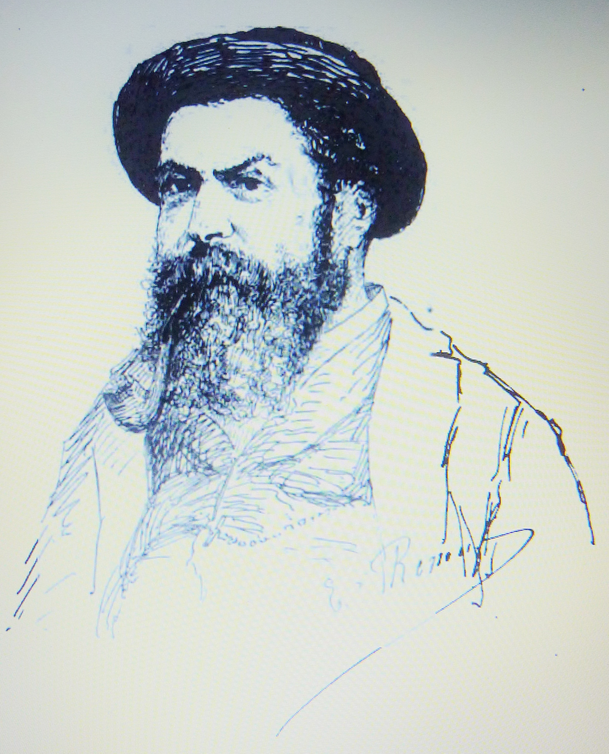 Emile Renouf Autoportrait